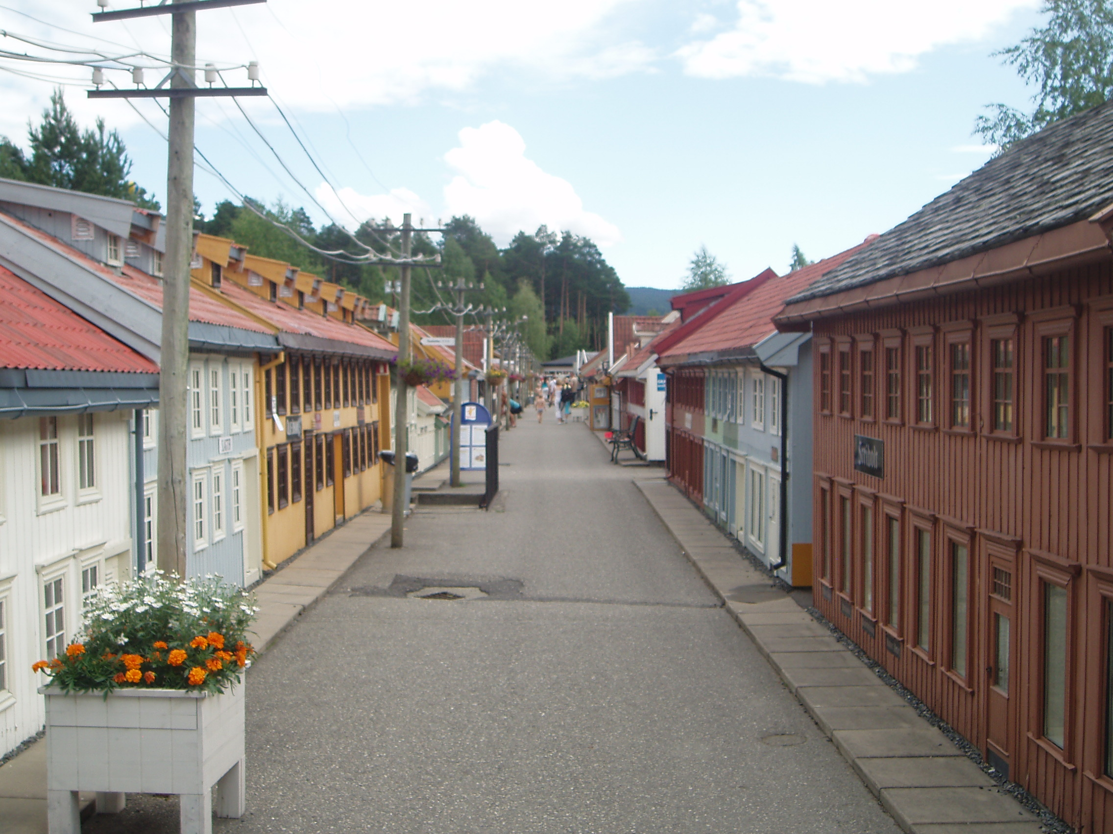 Miniatyrparken "Lilleputthammer", nord for Lillehammer.